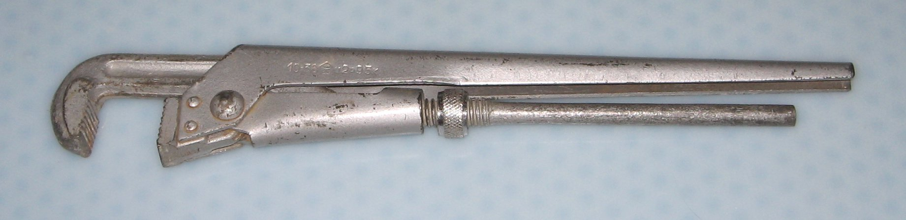 Universala rencxilo, kiu estas destinita unue por rencxi tubojn kaj aliajn rondajn ajxojn de cxiu diametro en certa bendo. La foto estis farita de mi mem.